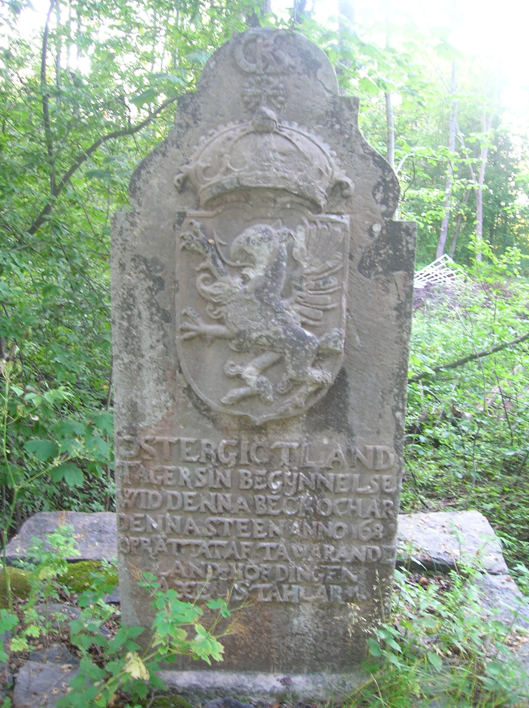 A stone marks the border between Östergötland and Södermanland at Krokeks ödekyrka, Sweden The text on the stone : Östergötland tager sin begynnelse vid denna beck och är denna steen anno 1684 upprättat af tåvarande landshöfdingen Axel Ståhlarm